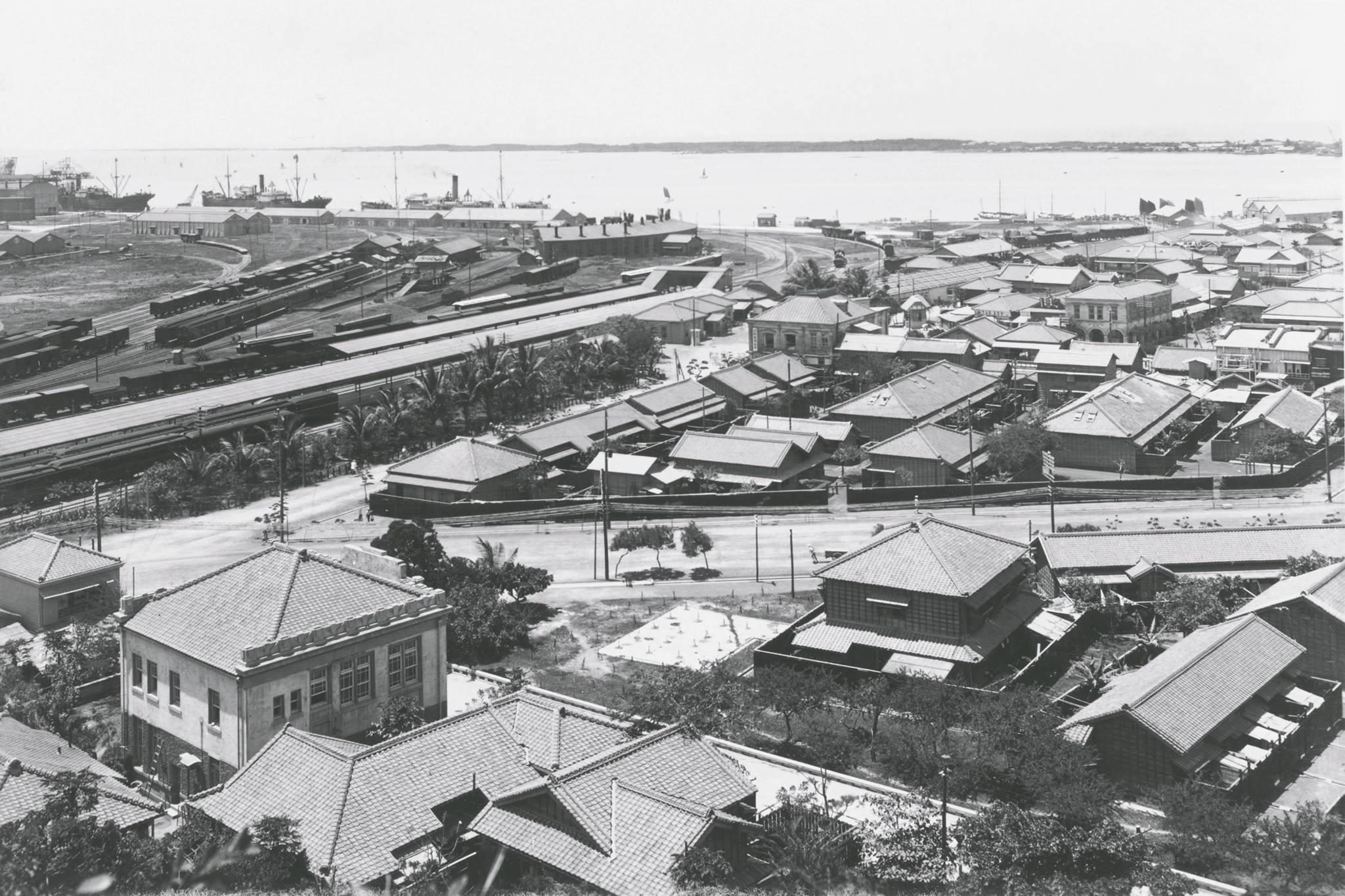 高雄車站附近都市景觀。